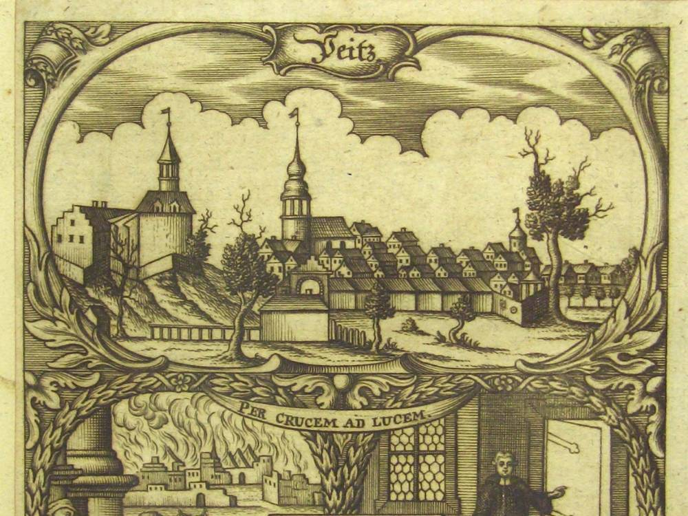 Gesamtansicht auf Peitz. Kupferstich aus: Privil. Zittauisches ... Tage-Buch. ca. 1798, Bildgröße: 18×14,5 cm, Blattgröße: 19×17 cm